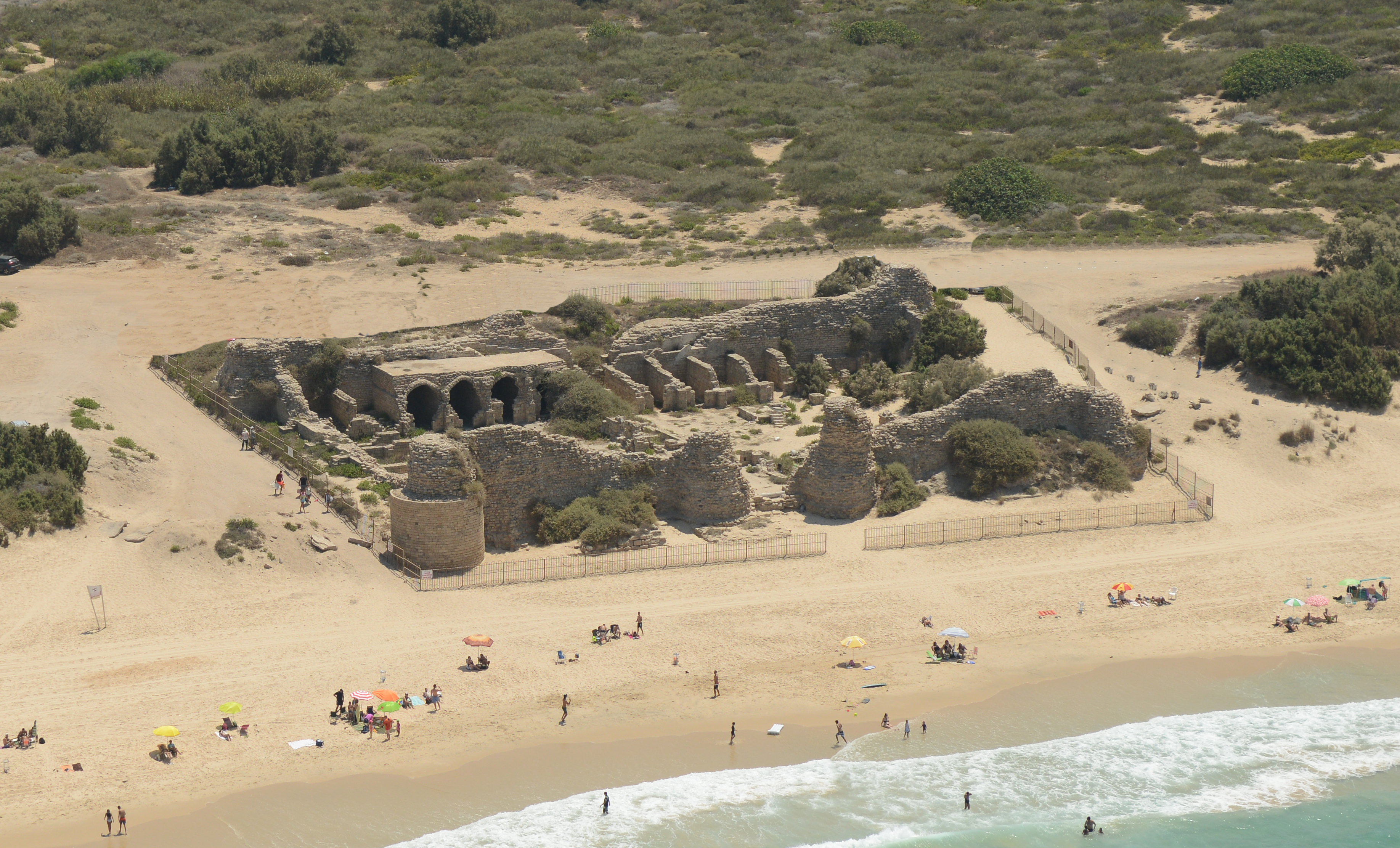 אשדוד-ים הייתה עיר מסחר משגשגת עם נמל עמוק-מים שנקראה בשם היווני אזוֹטוֹס פאראליוֹס, ותועדה במפת מידבא. העיר המשיכה להתקיים בתקופה הערבית הקדומה, בין המאה ה-8 למאה ה-11 - התקופה ממנה נשמרו השרידים המרשימים שנמצאים לחופה הדרומי של אשדוד, וביניהם מצודת אשדוד-ים הגדולה שמכונה בערבית קלעת אל-מינה. חפירות ארכאולוגיות נערכו באתר על ידי יעקב קפלן בשנים 1968-1965. בחפירות נתגלו כמה ממצאים וביניהם חרסים ומטבעות עתיקים מהתקופה הערבית בארץ ישראל. ההנחה כי מצודה זו, בדומה למצודות שנמצאו ביבנה ים ובאשקלון נועדו להגנה מפי פלישות מהים התיכון. בינואר 2014 נפתחו לציבור שתי אחוזות קבר השייכות לבית הקברות של העיר אשדוד-ים מהמאה ה-4 עד המאה ה-6, בהן נקברו בני המעמד הגבוה מהתקופה הרומית ומהביזנטית.